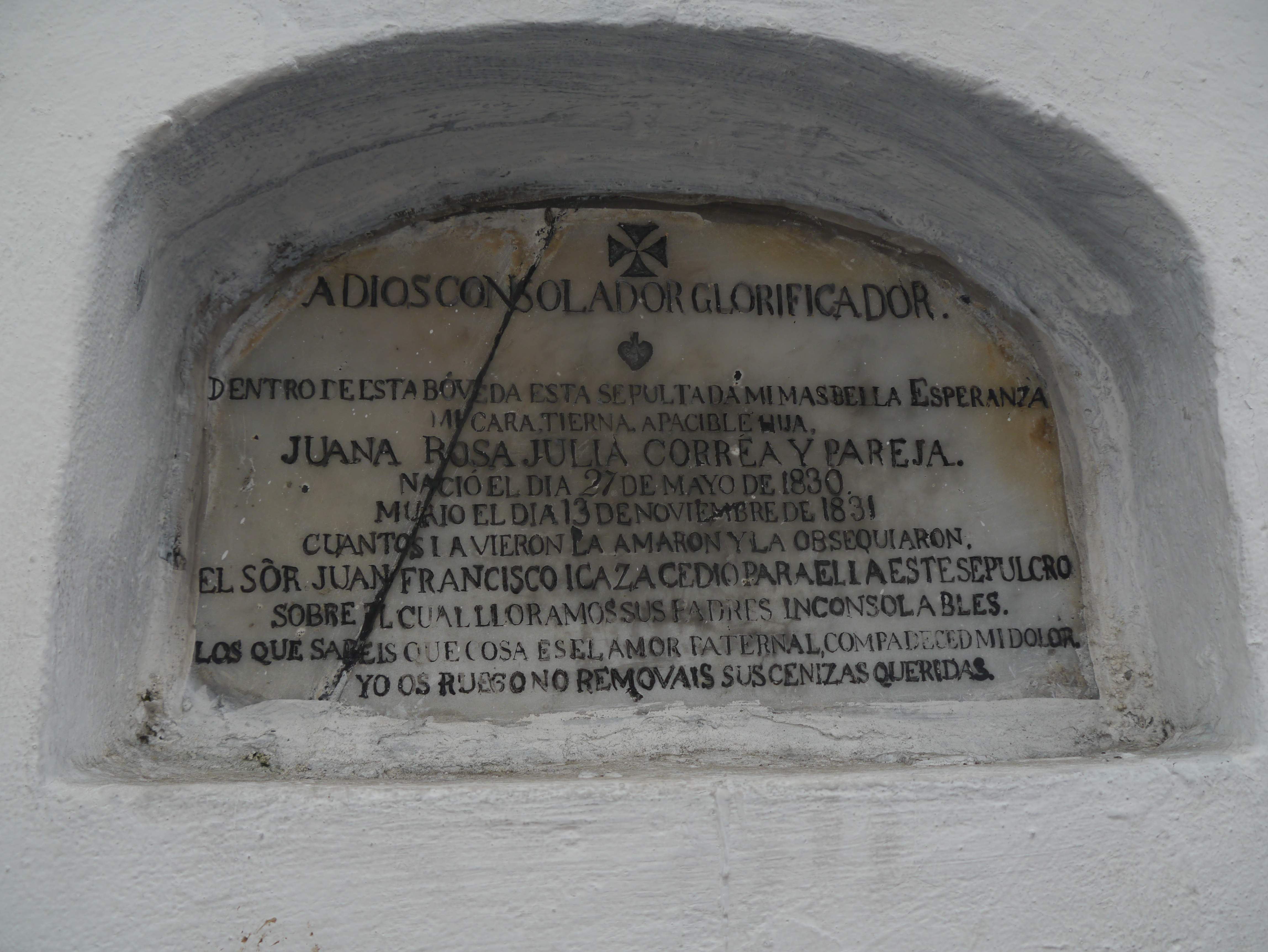 Fotografía tomada en el Cementerio General de Guayaquil